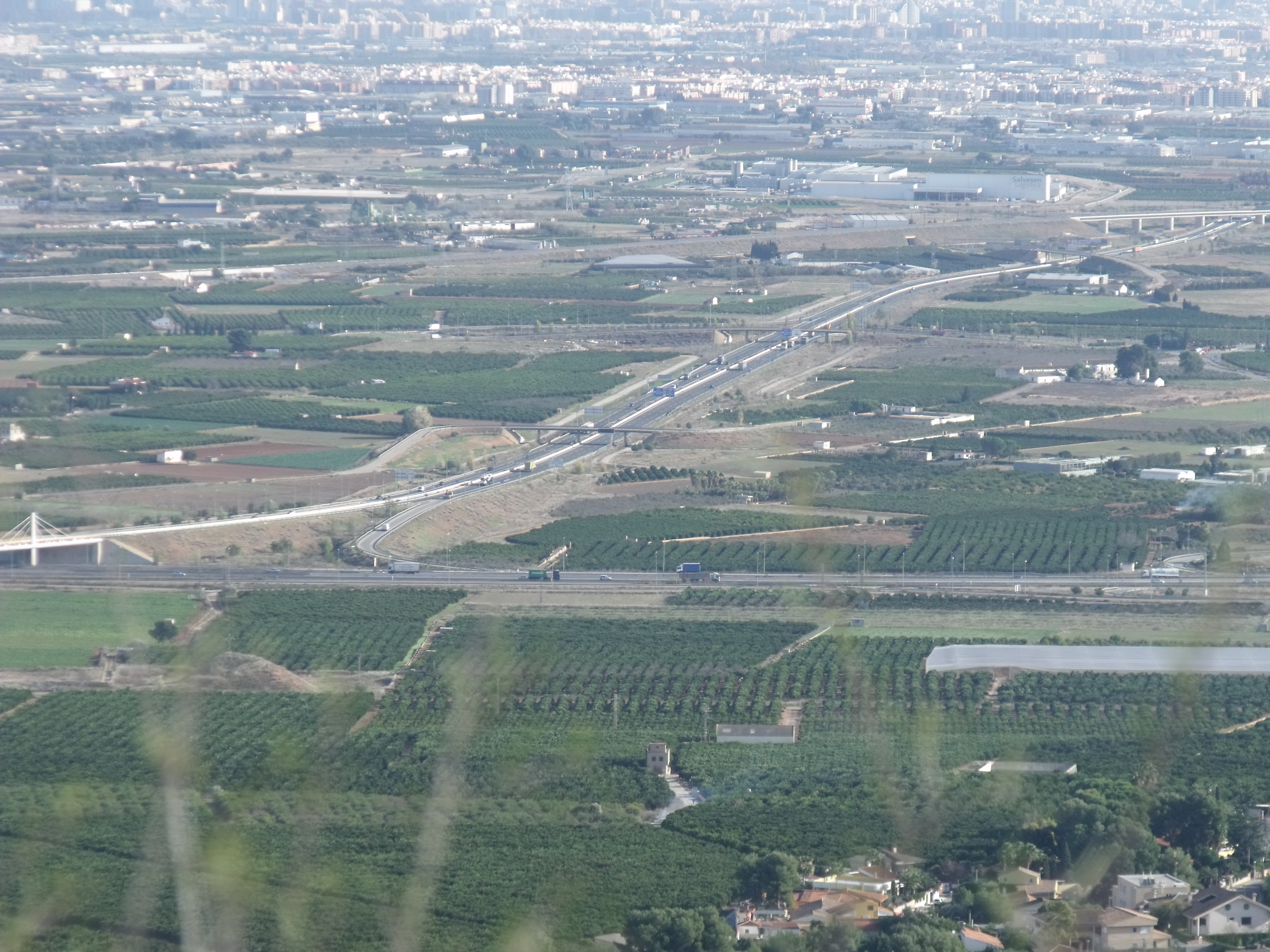 Autovías CV-36 y A-7 en Torrente, visto desde la Sierra Perenxisa.